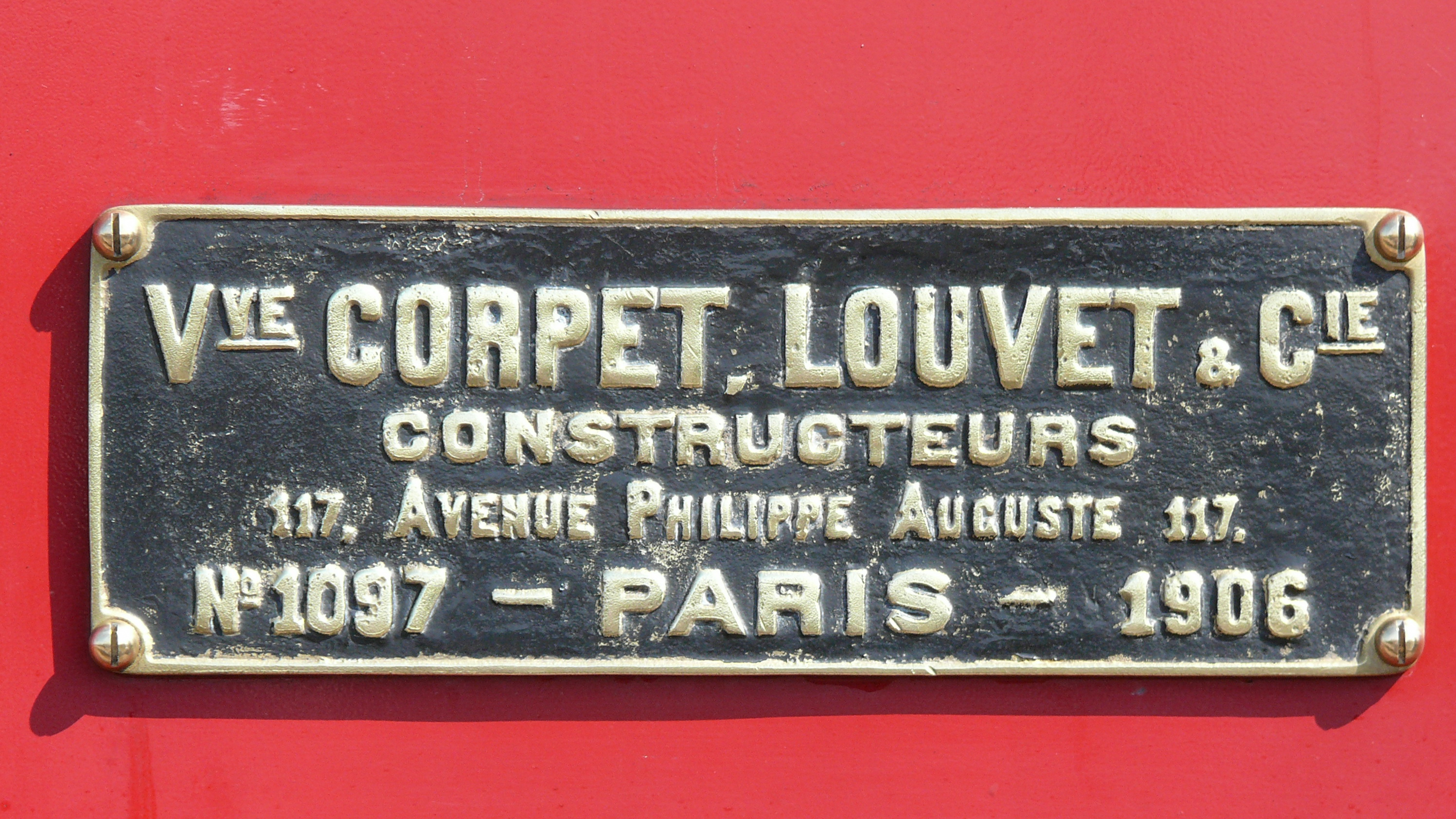 Corpet-Louvet : Plaque de constructeur de la locomotive type 130T N° 1097 du constructeur, N°1 des Chemins de fer départementaux de l'Aisne, préservée au CFBS